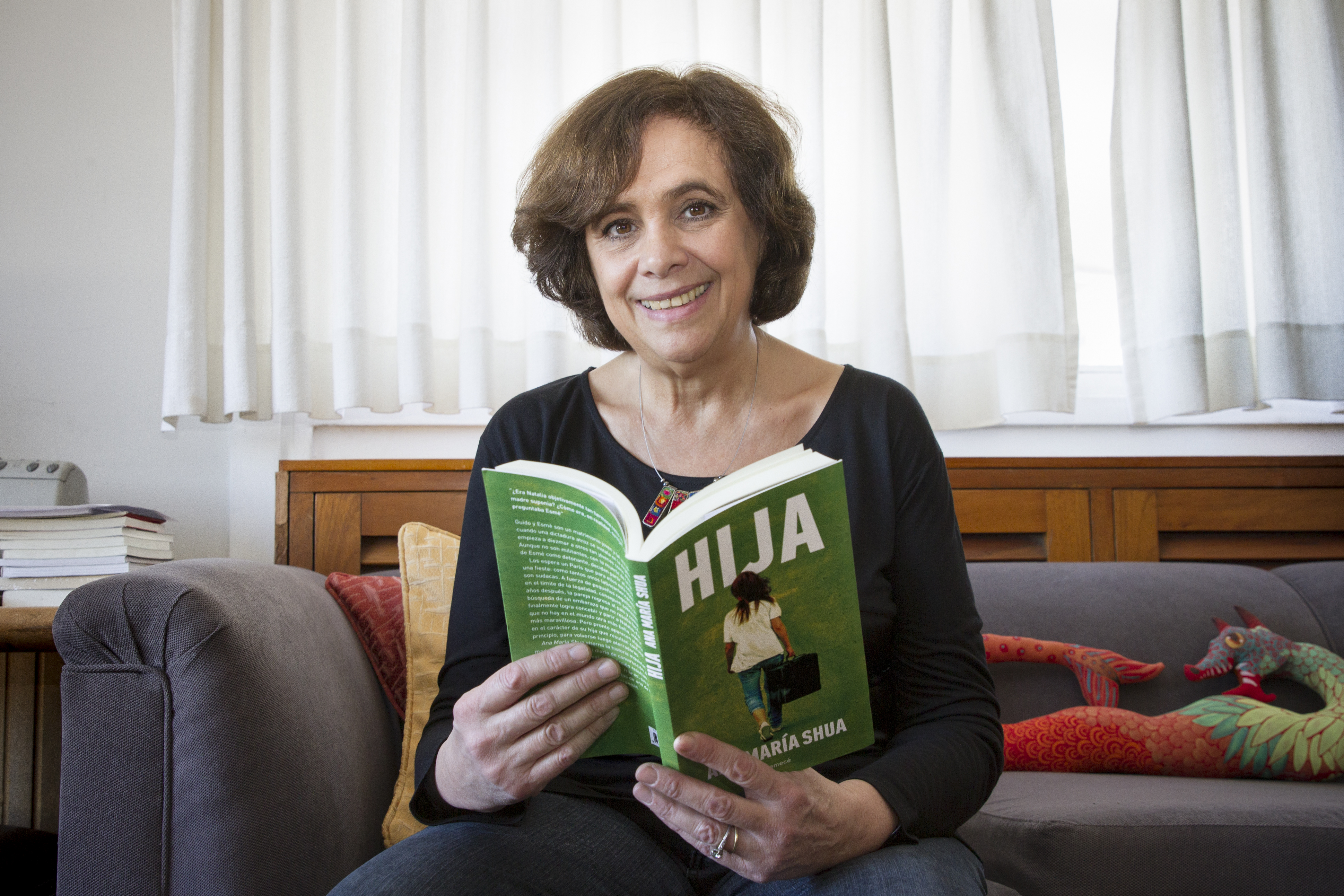 Buenos Aires, 29 de julio de 2016 - Ana María Shua formará parte de los Talleres de escritura que se realizarán en la Biblioteca Nacional. Fotos: Soledad Amarilla / Ministerio de Cultura de la Nación